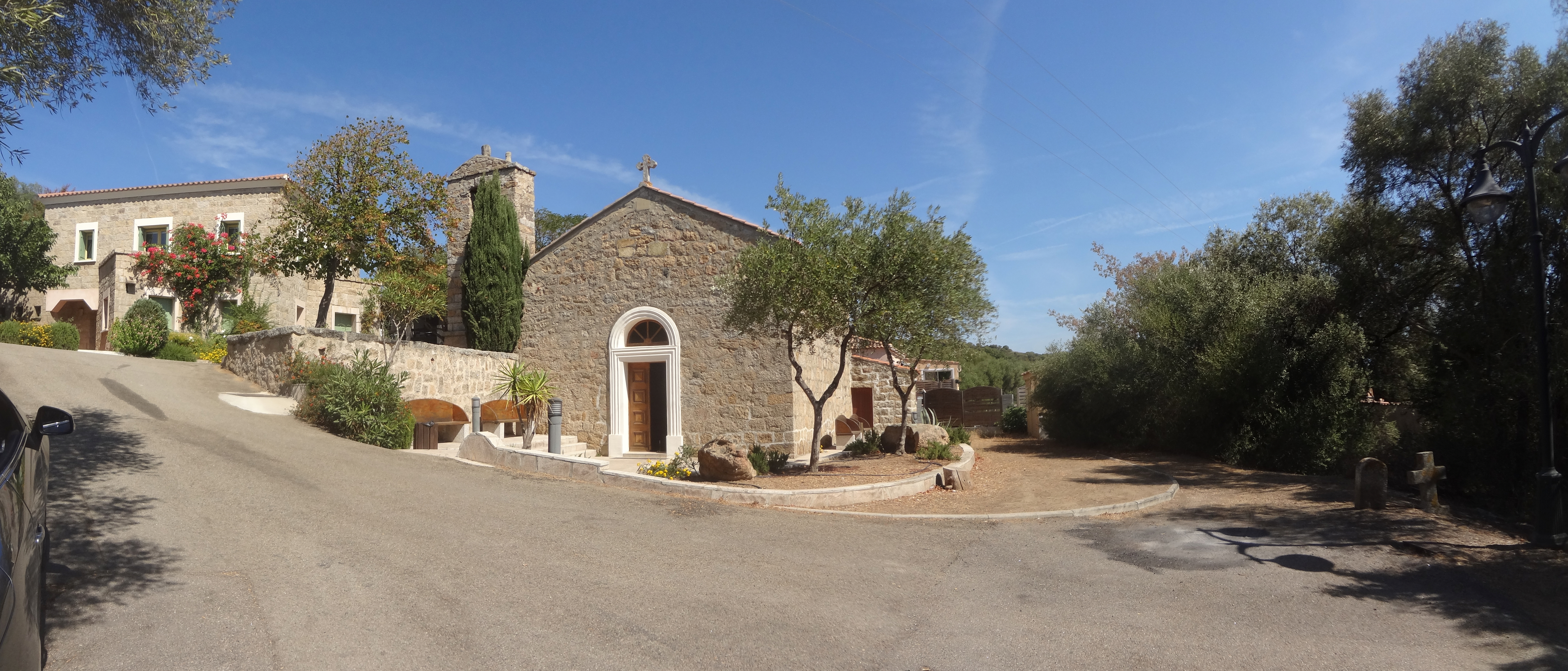 Serra-di-Ferro, Corse - Église Sant'Antonu du XIXe siècle.